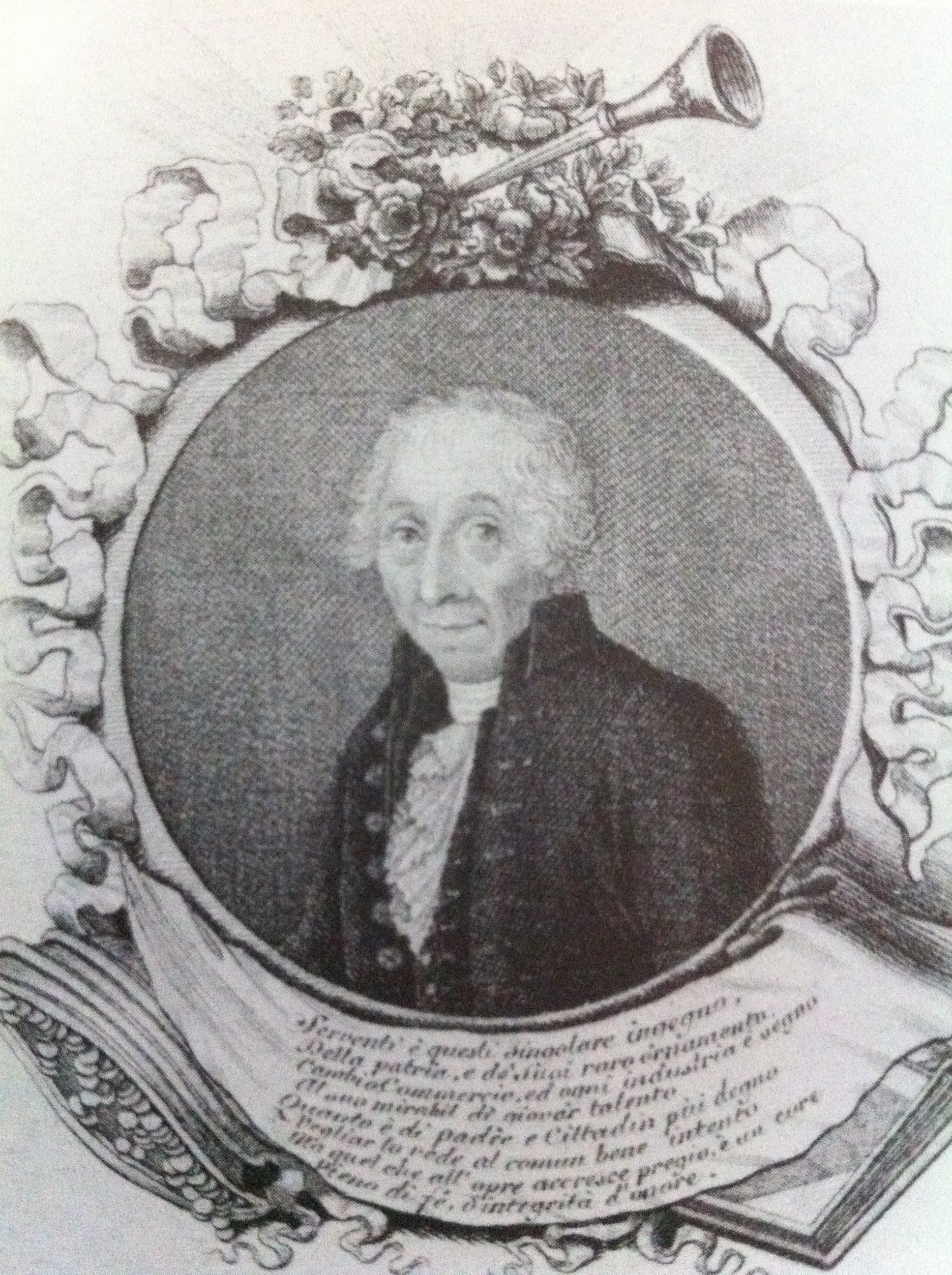 Giuseppe Serventi (1743-1826)